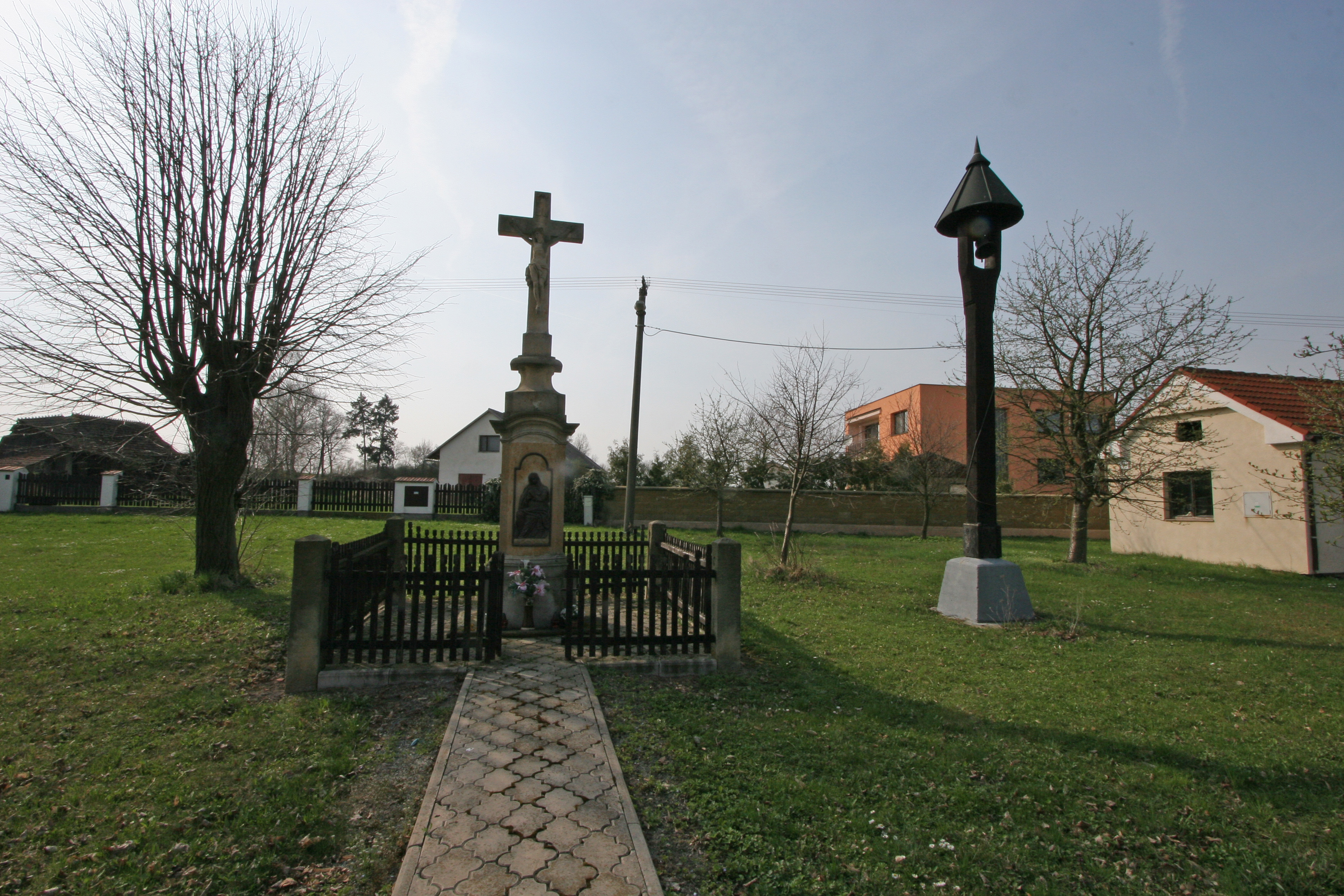 Přepychy křížek a zvonička